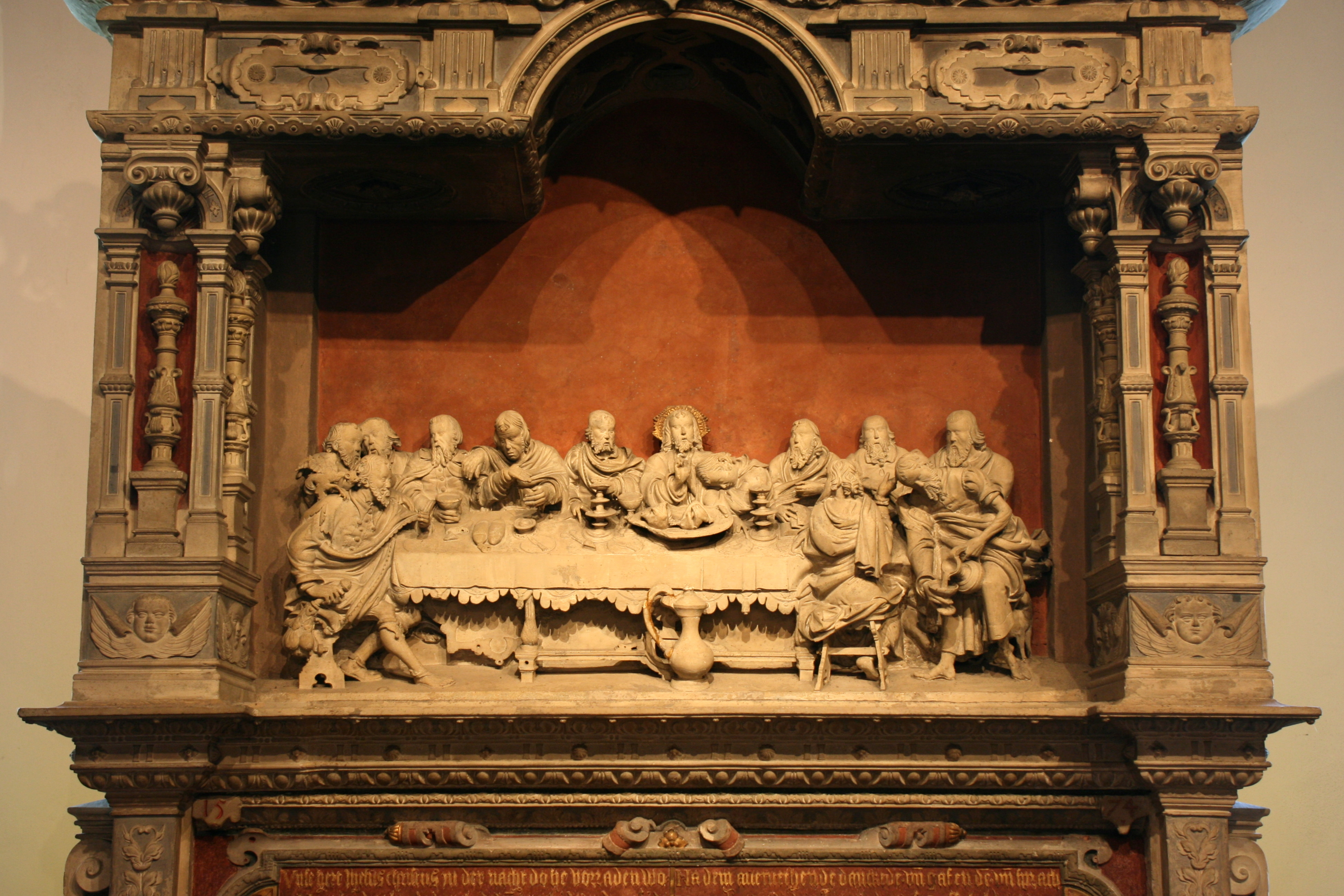 Bleckkirche, Bleckstraße 1 in Gelsenkirchen